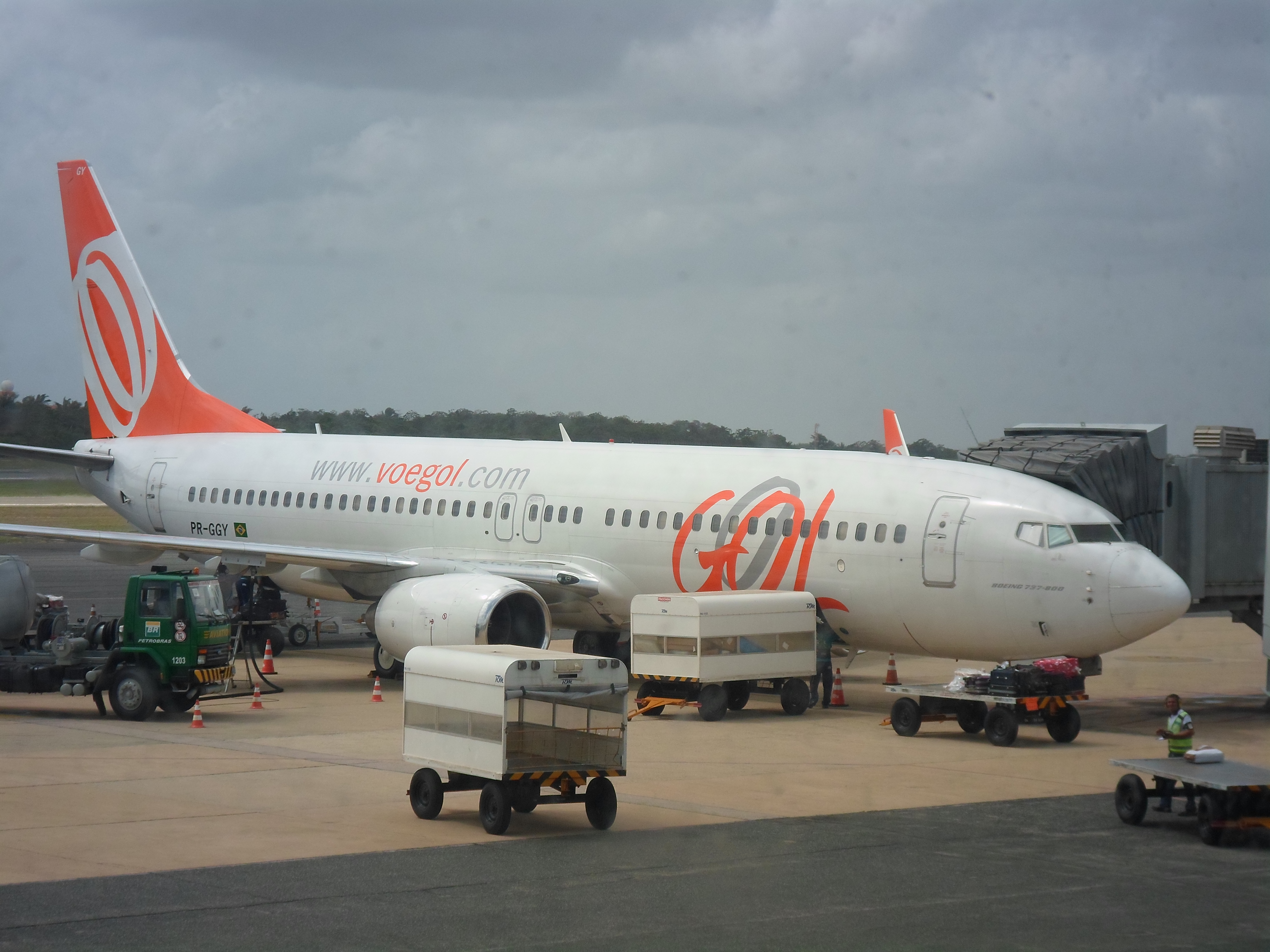 Boeing 737-800 da Gol, de prefixo PR-GGY, no Aeroporto de São Luís.